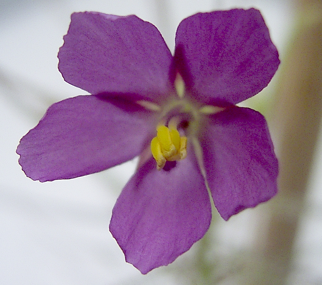 Byblis aquatica flora